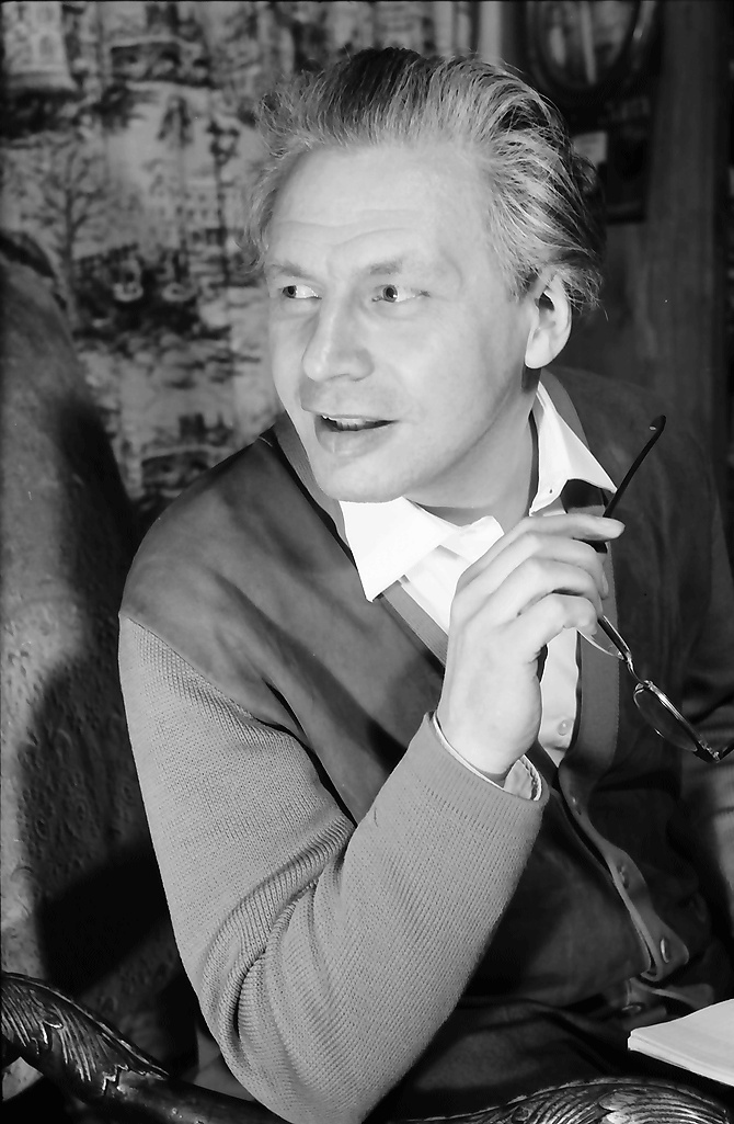 Freiburg: Stadttheater Basel; Intendant des Basler Stadttheaters, Hermann Wedekind, Ausdrucksstudien